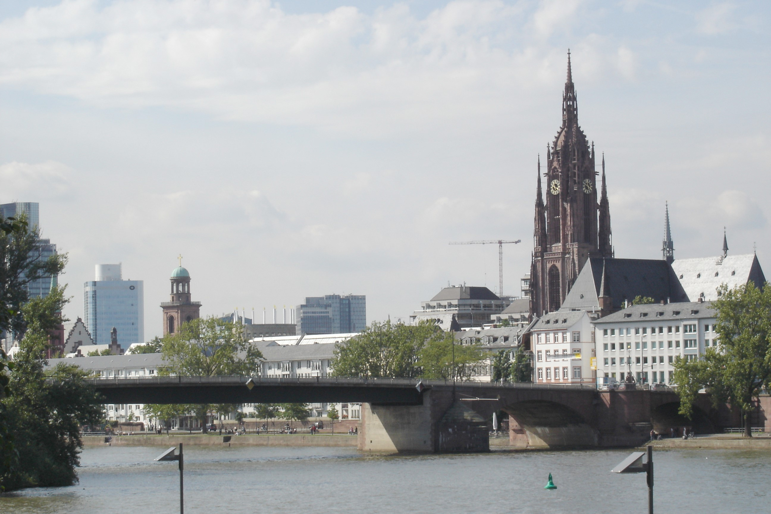 "Alte Brücke" vor Panorama mit Dom und Paulskirche in Ffm